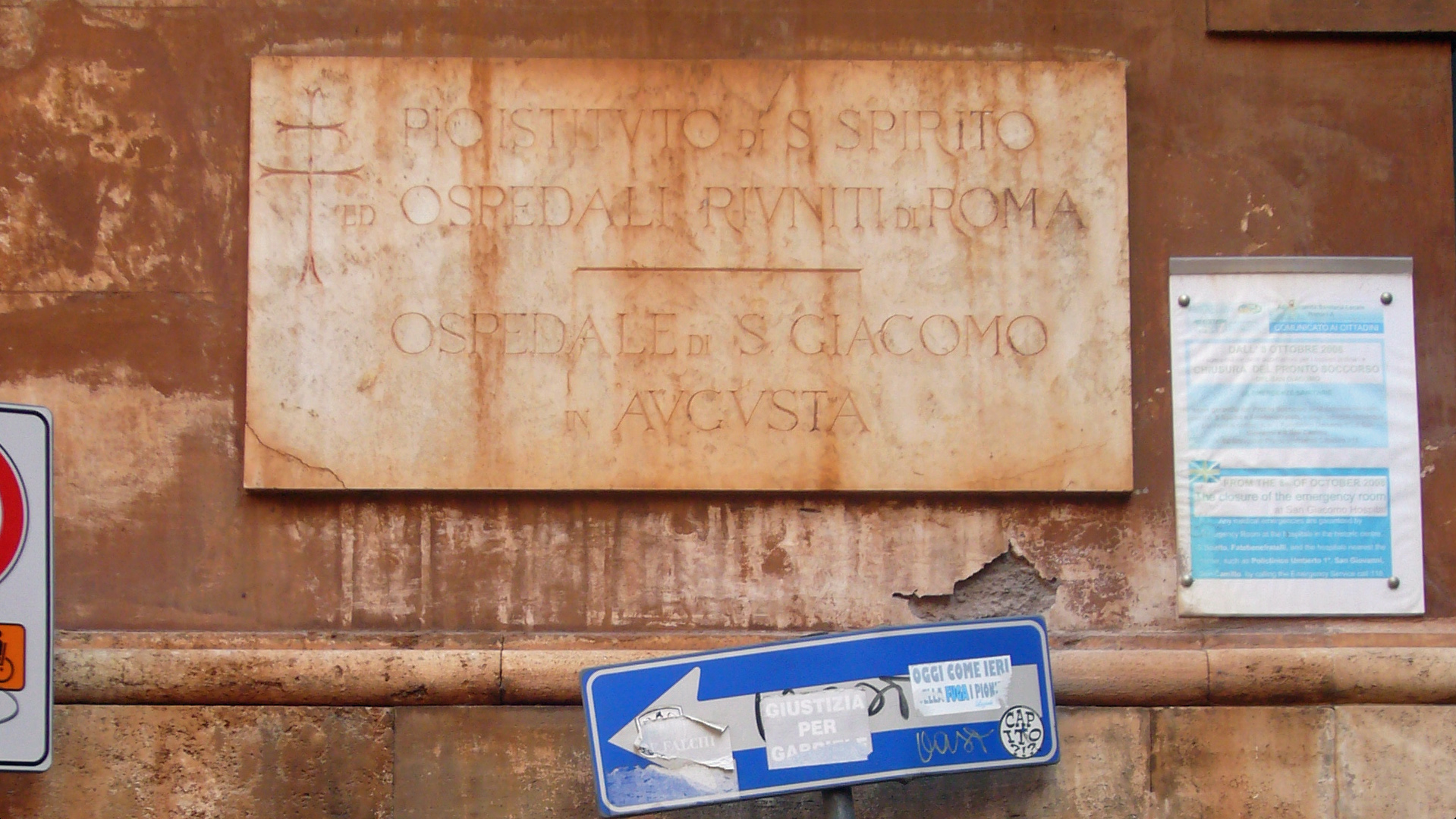 Roma, via Canova. Targa dell'ospedale di S. Giacomo e avviso di chiusura dall'8 ottobre 2008.